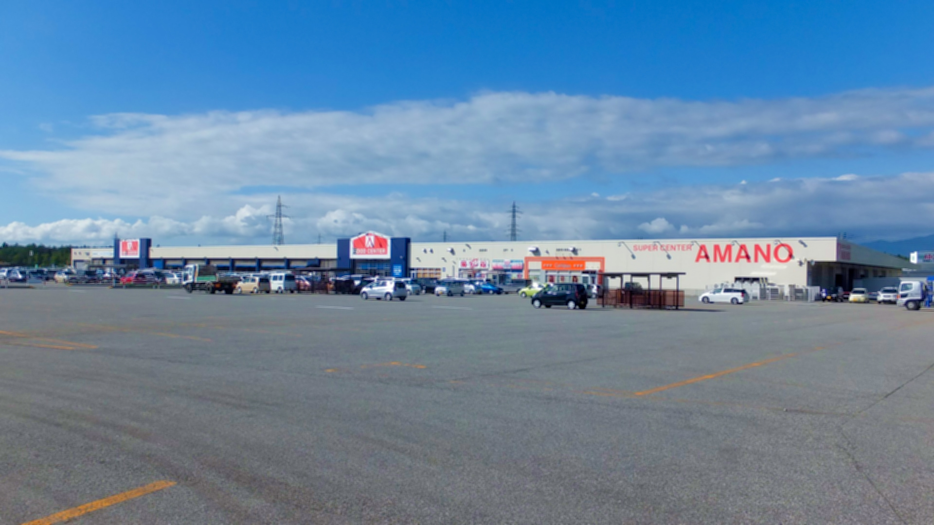 スーパーセンターアマノ御所野店（秋田市御所野堤台）